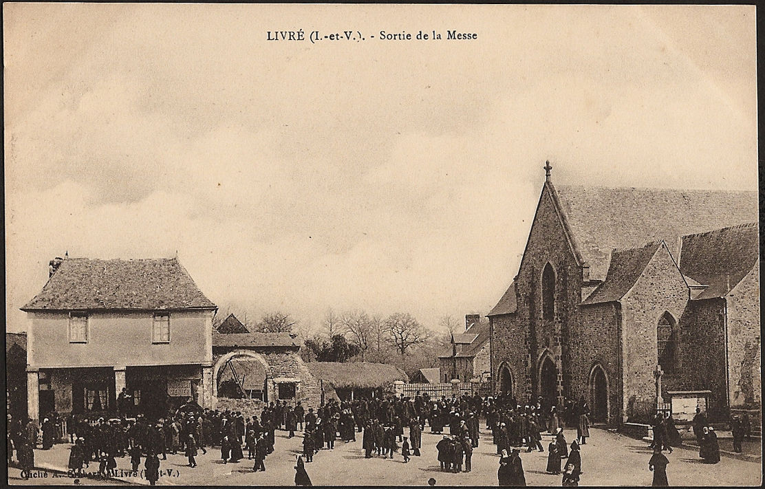 Sortie de messe à Livré vers 1910-1914.